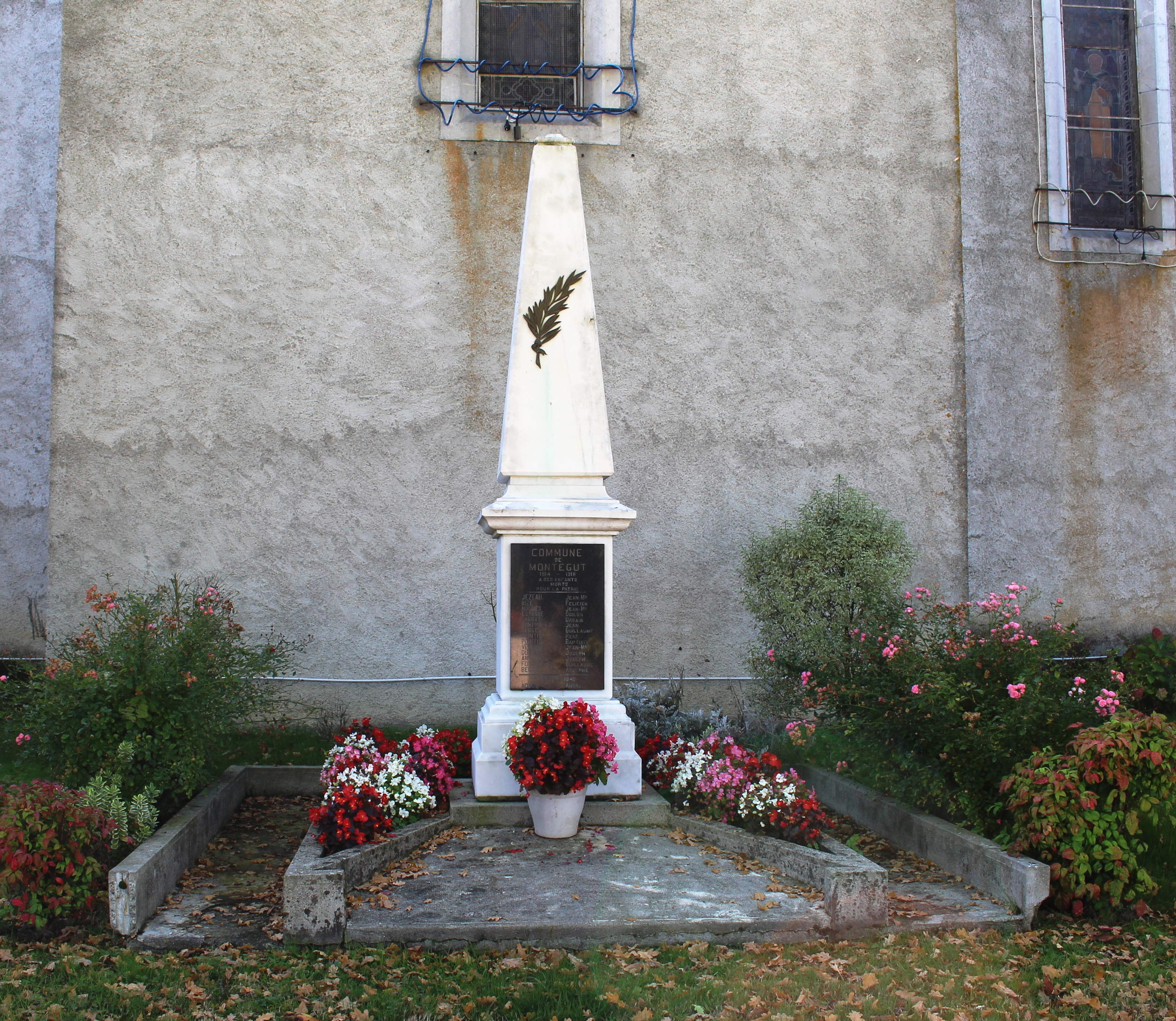 Monument aux morts de Montégut (Hautes-Pyrénées)